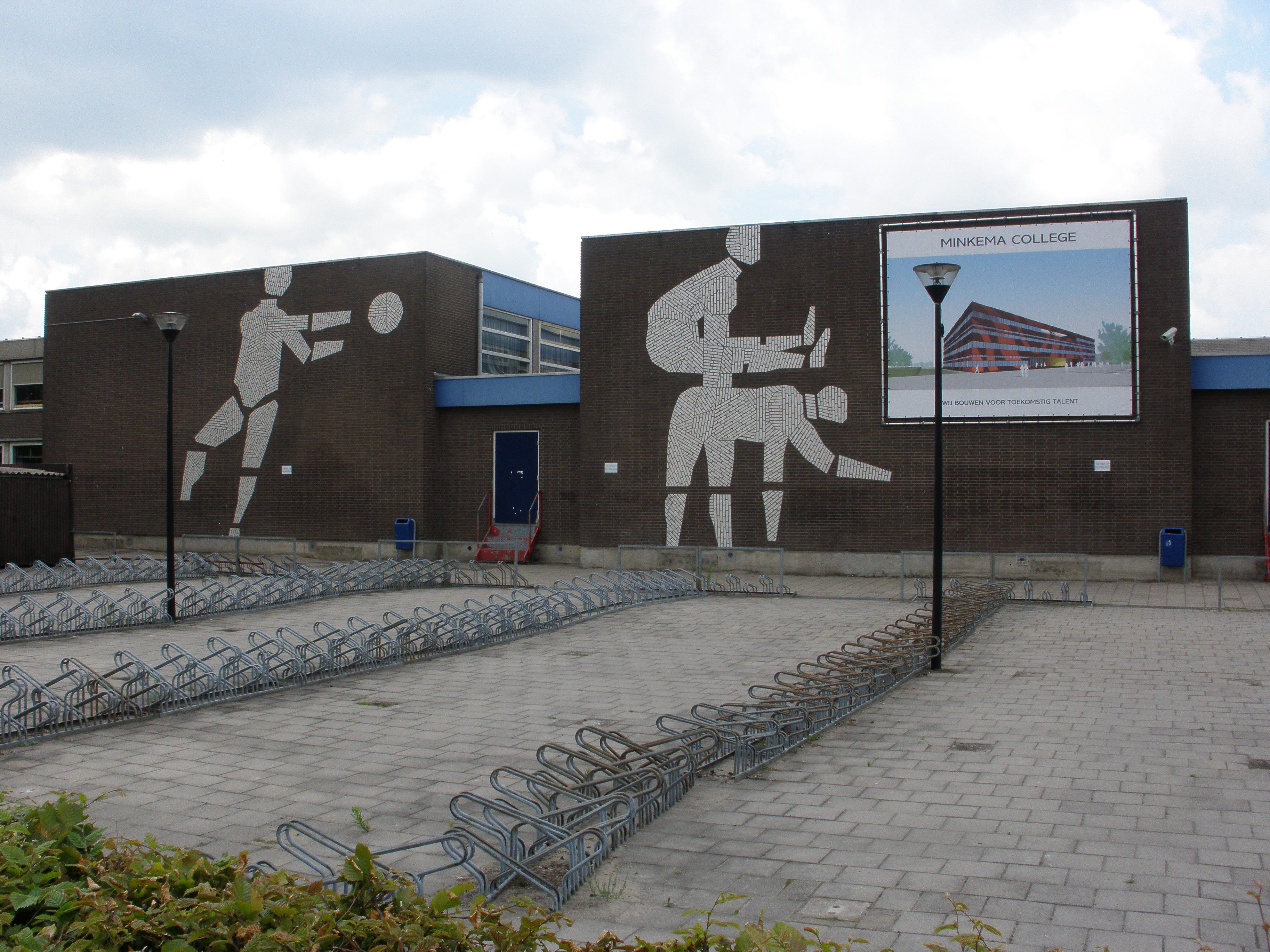 Kunstwerk De bokspringer en de balgooier van Bouke IJlstra op de muur van het Minkema College in Woerden.